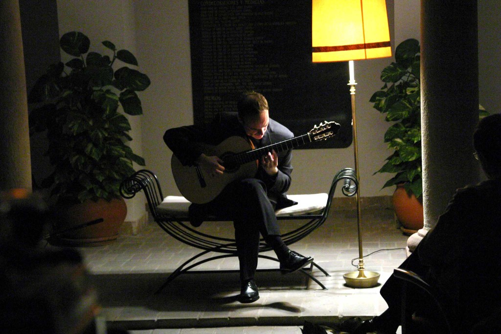 Concierto de Guitarra en la Casa Museo "Andrés Segovia"